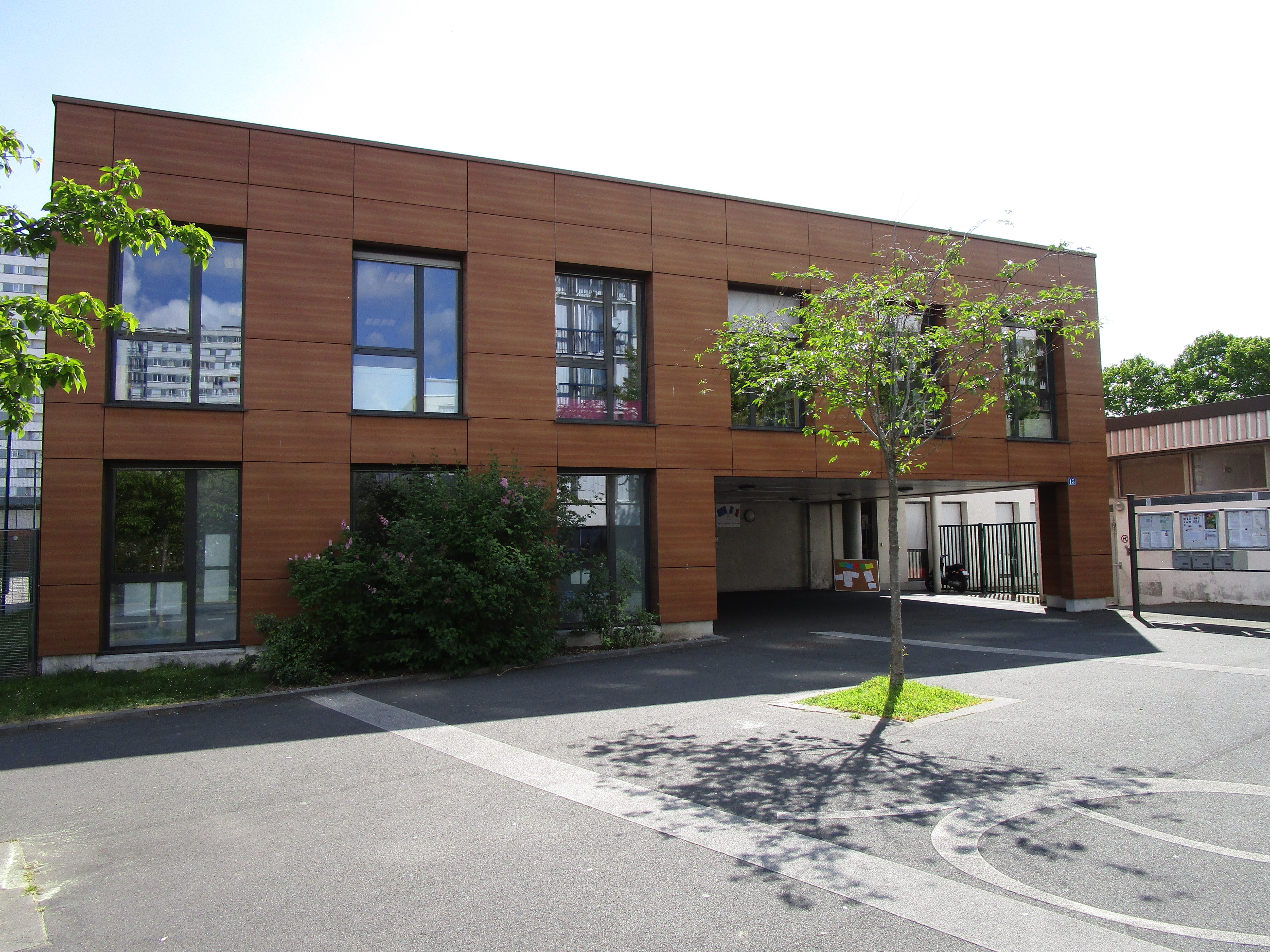 L'école pré-élémentaire Georges Duhamel de Tours, dans le quartier des Rives du Cher, façade ouest.